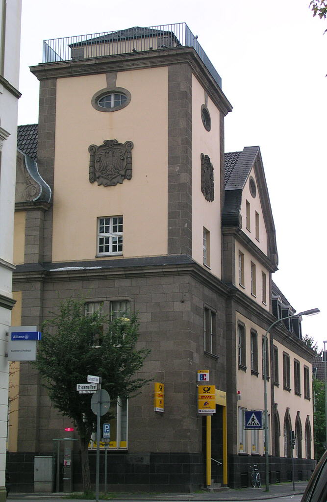 Eschweiler, Hauptpost